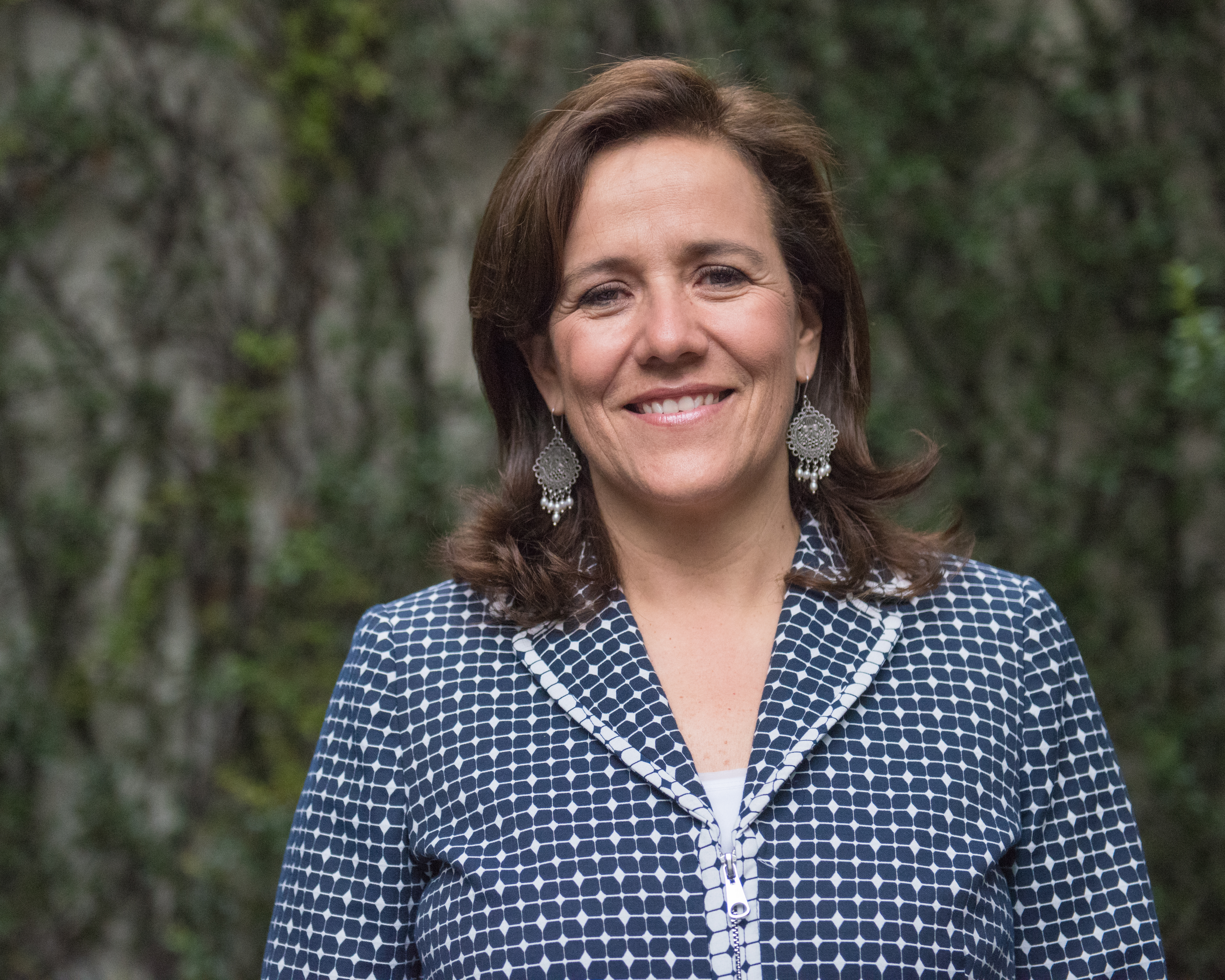 Política mexicana. Diputada plurinominal del Congreso de la Unión durante la LIX Legislatura.